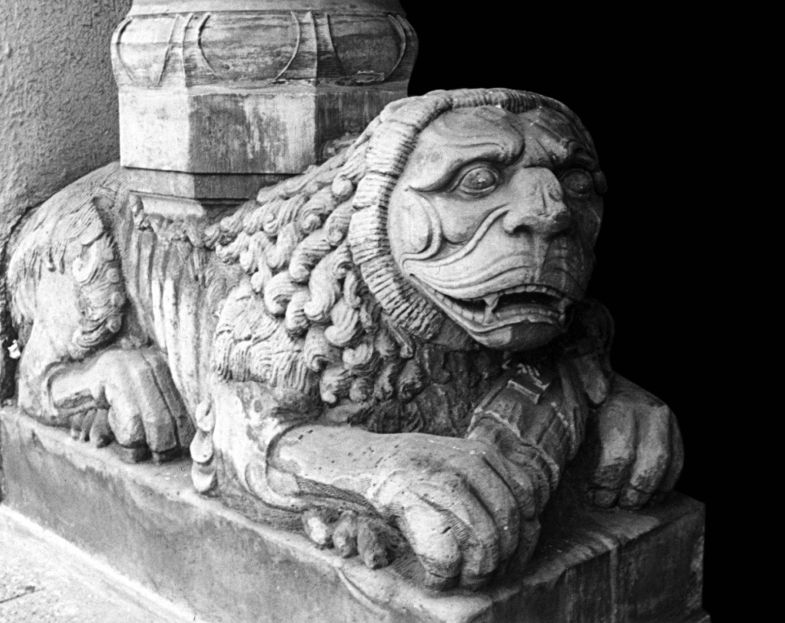 Zespół kościoła parafialnego pw. św. Pawła: kościół i plebania Ruda Śląska Nowy Bytom, Plac Wolności 5 (obecnie plac Jana Pawła II), Ruda Śląska